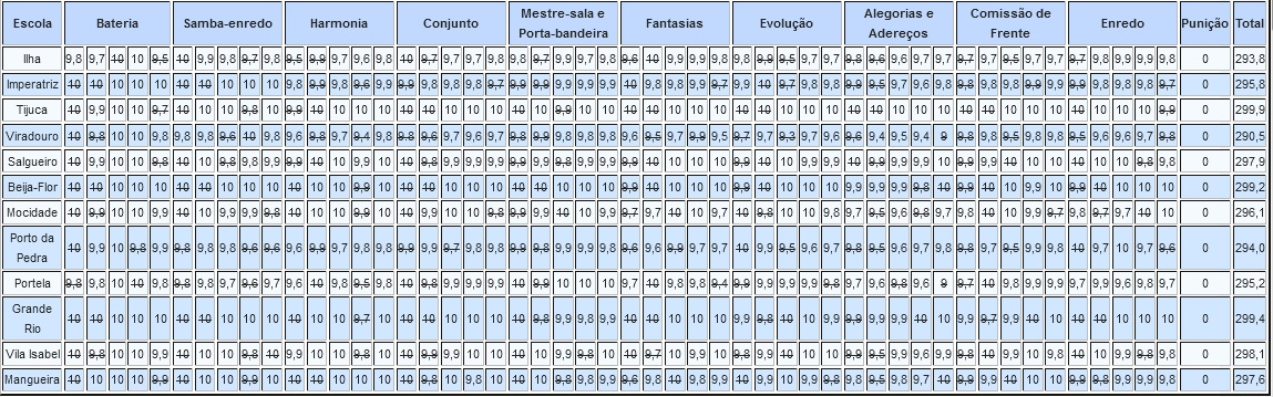 Resultados do Carnaval do Rio - 2010